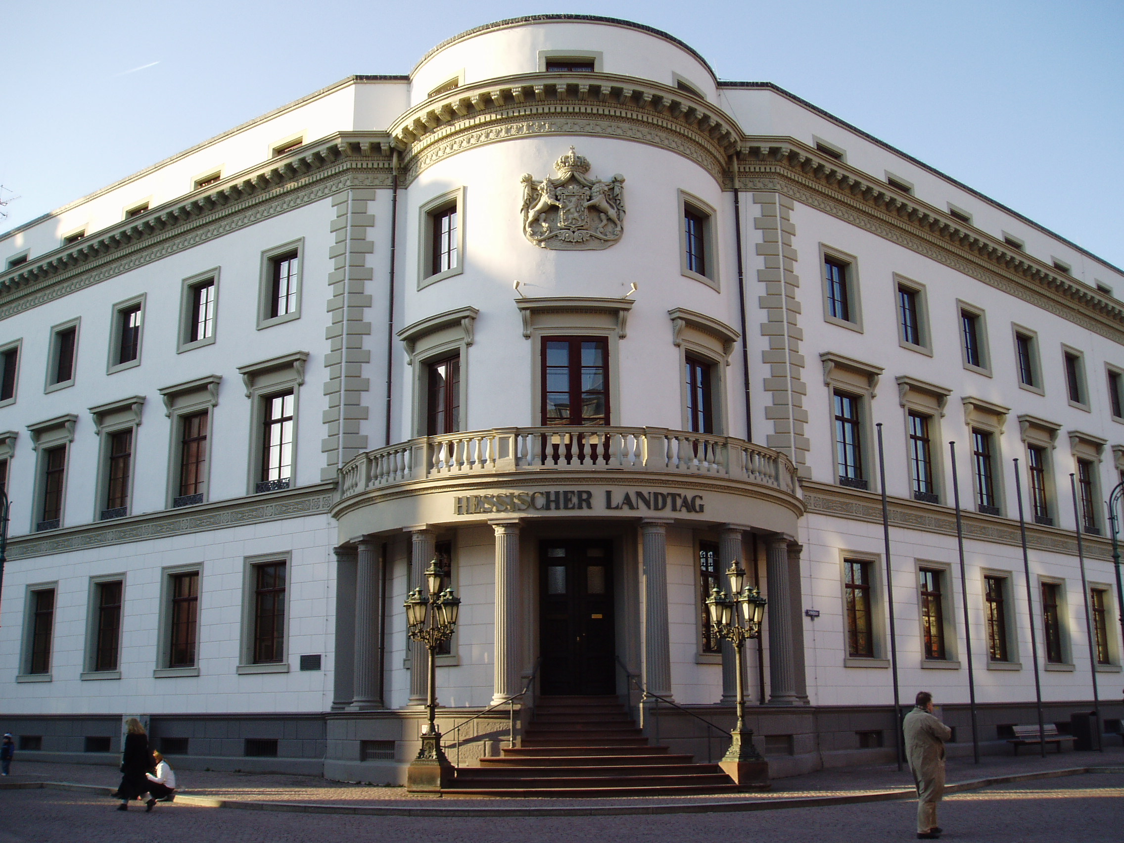 Das Bild zeigt die markante Ecke des 1841 erbauten nassauischen Stadtschlosses in Wiesbaden. Aufgenommen vom Schloßplatz aus.